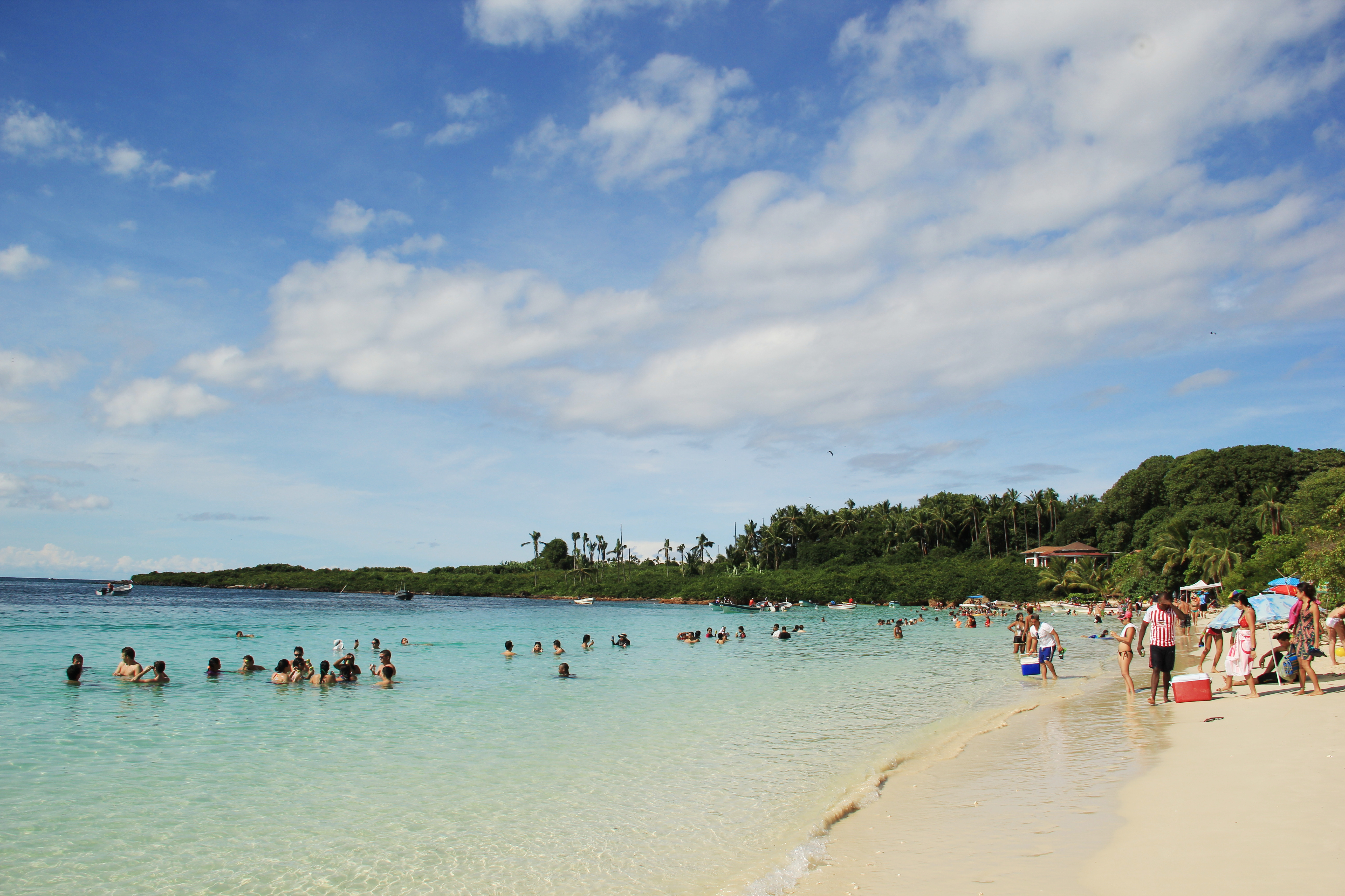 Isla Iguana, Pedasí, Panamá.